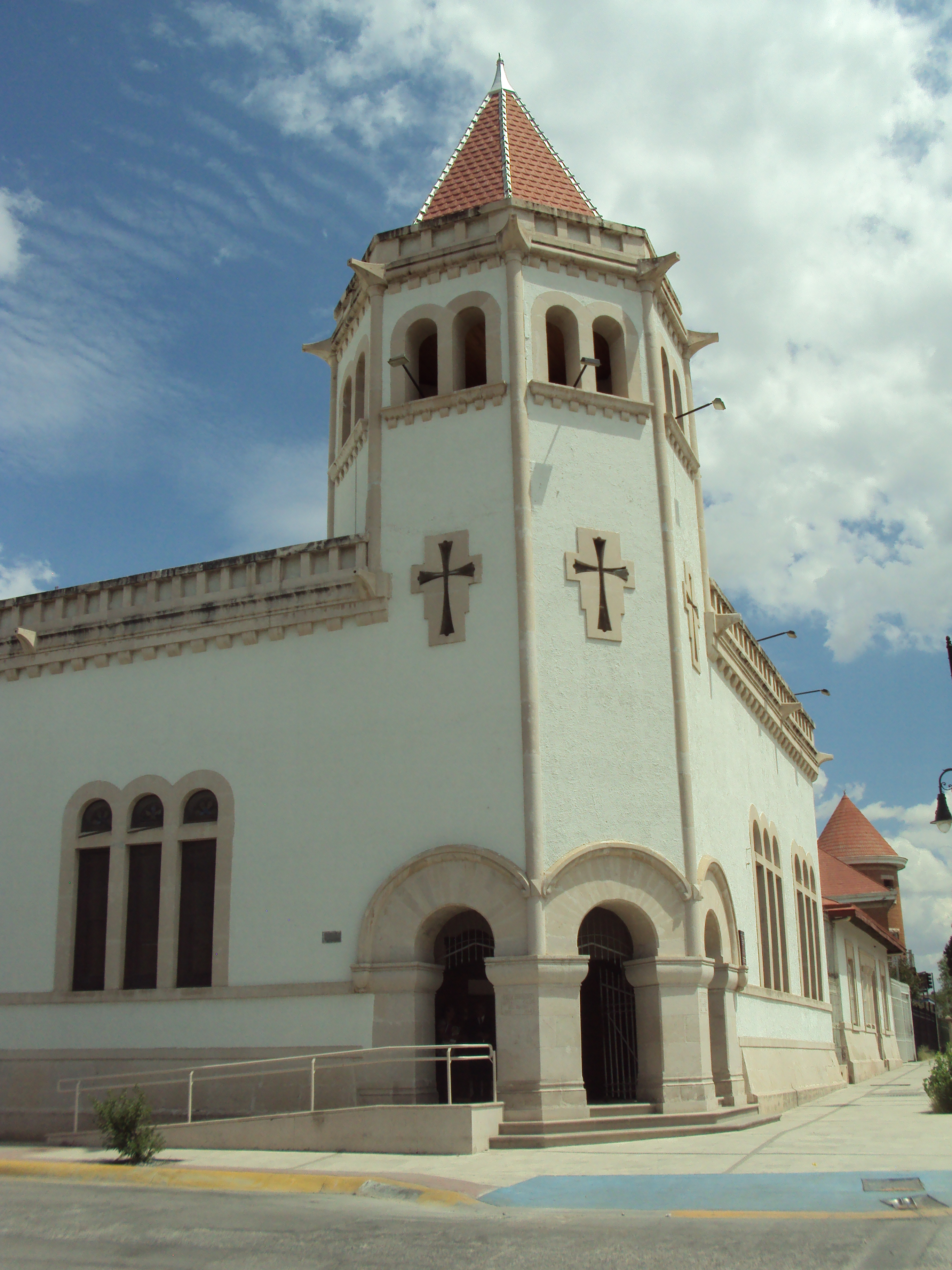 Templo Metodista de la Santisima Trinidad en la ciudad de Chihuahua, Chihuahua